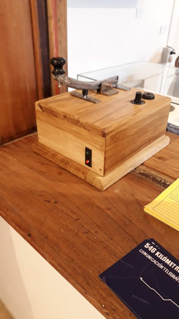 Telégrafo adaptado a la tecnología (proyecto "546 Km,comunicación telegráfica)